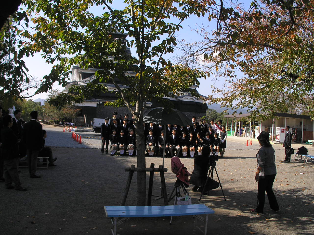 2004-11-08 Kumamoto Castle 熊本城 修学旅行生